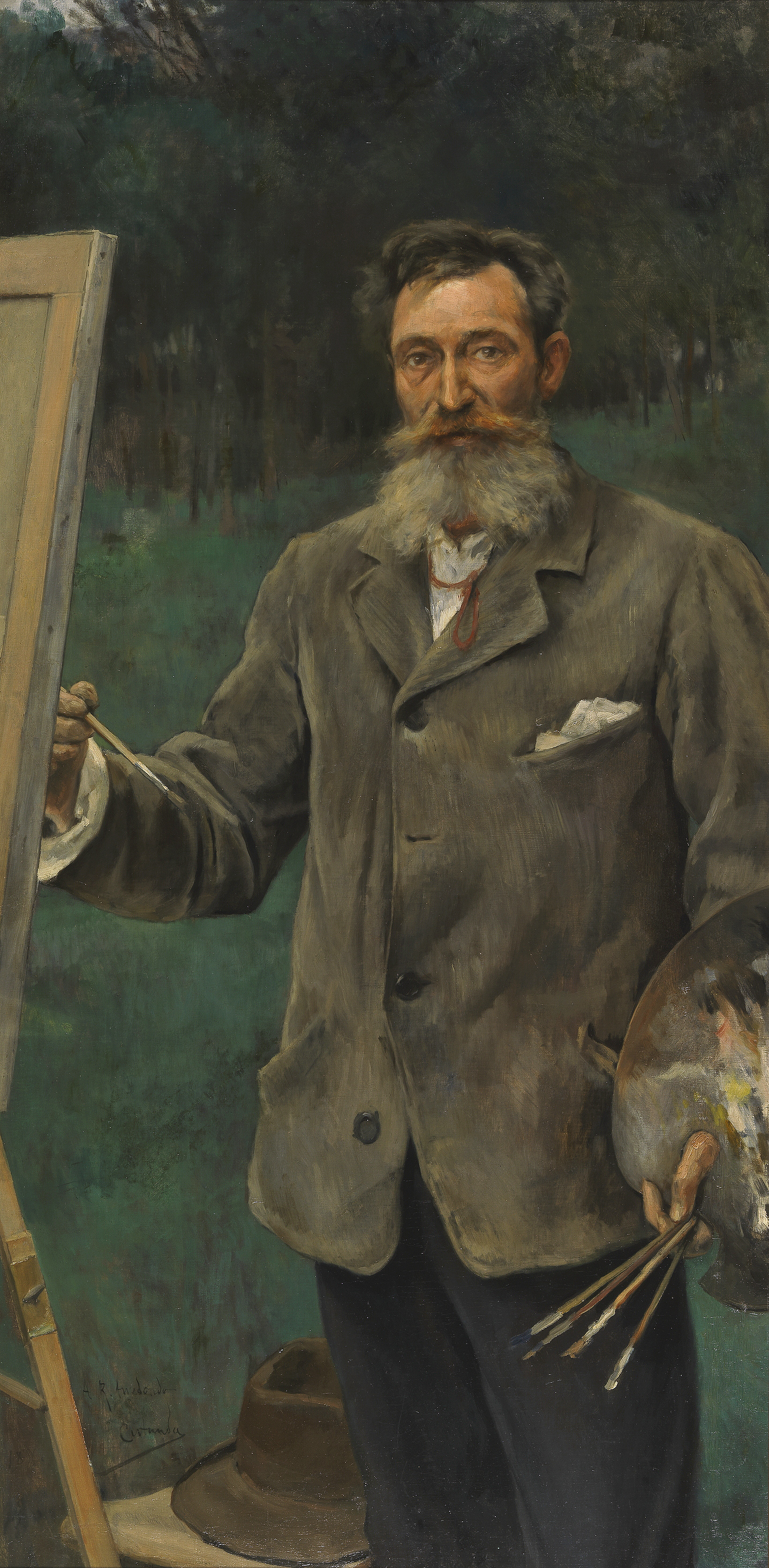 El pintor Ricardo Arredondo, por Vicente Cutanda. Museo del Prado.